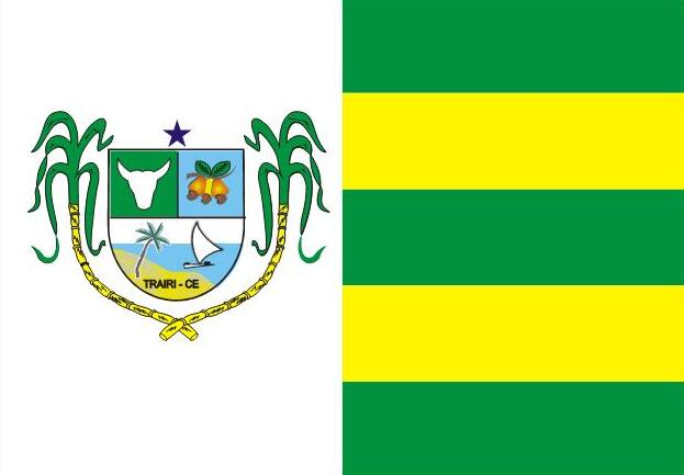 Bandeira do município de Trairi